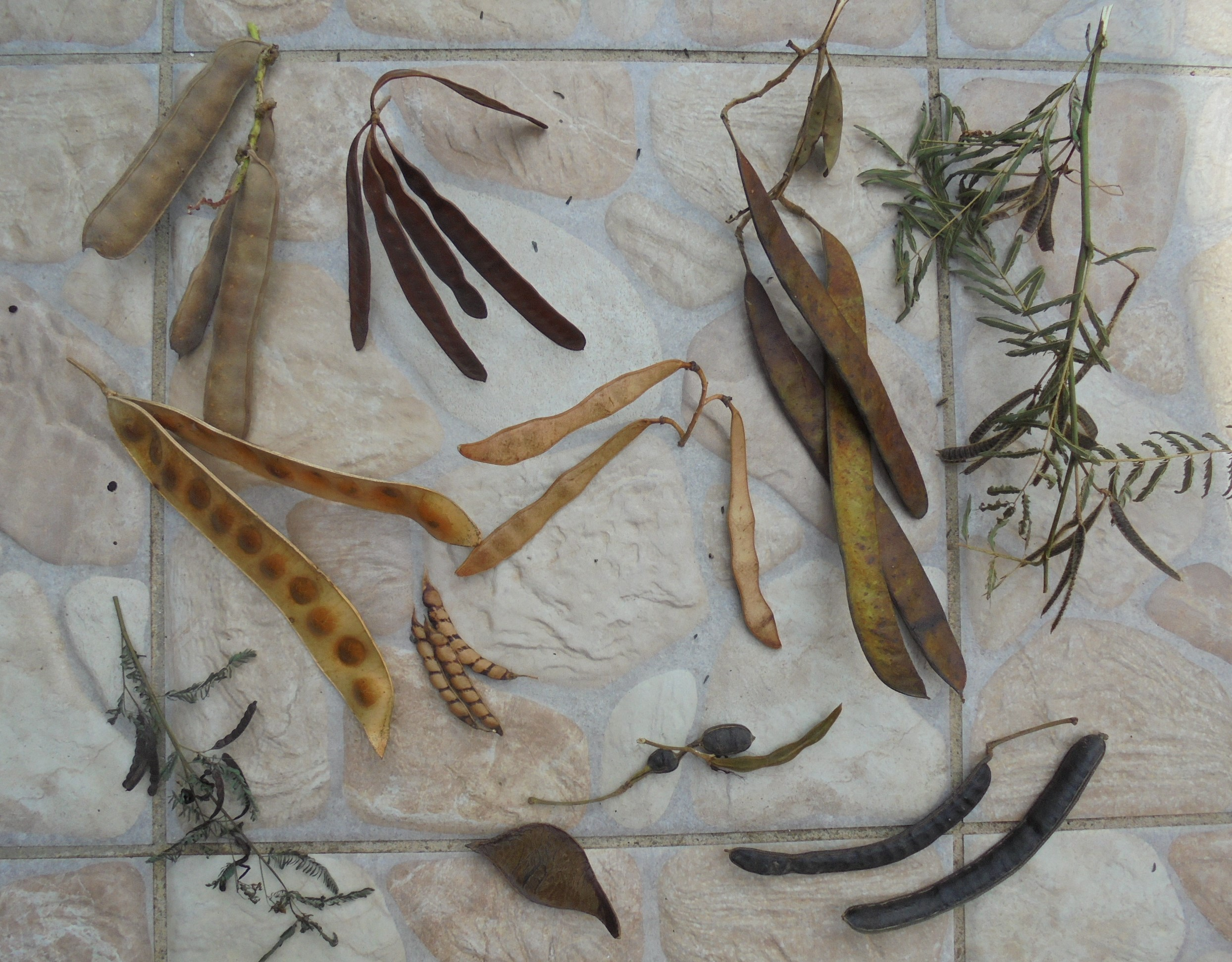 gousses de différentes espèces de fabacées tropicales récoltées en Martinique